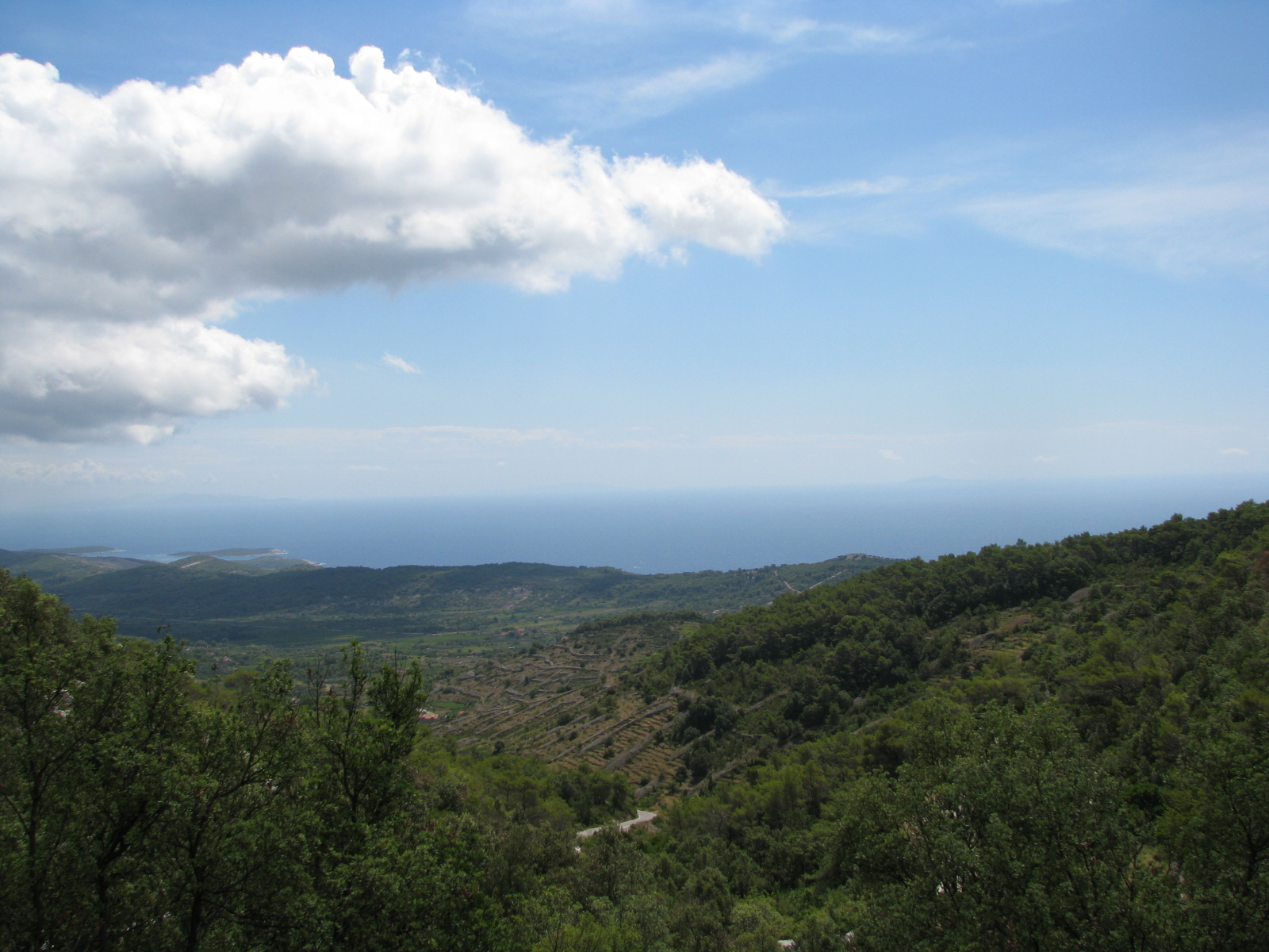 Pogled iz Titove špilje prema dolini i pučini